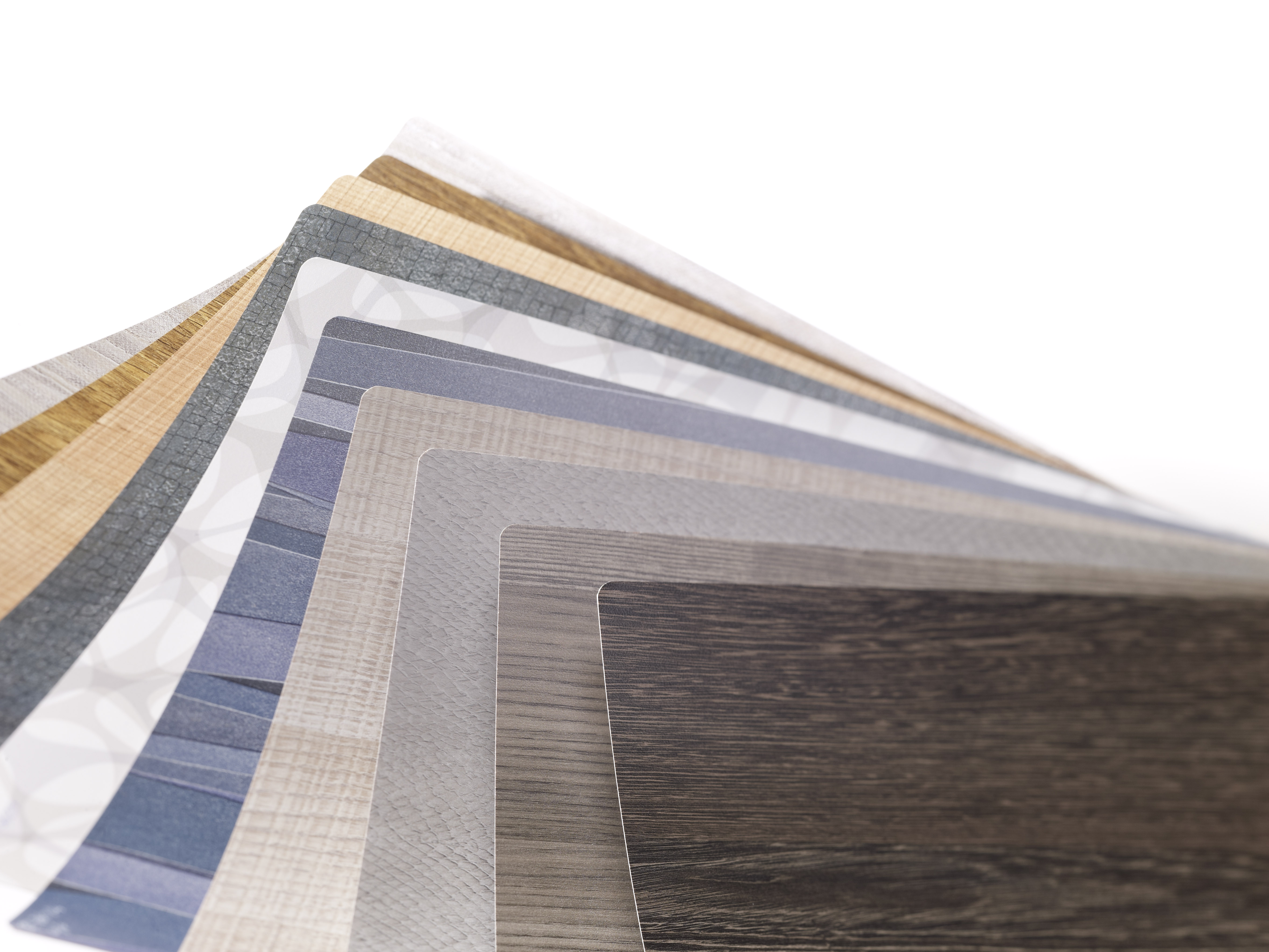 Materialbeispiele